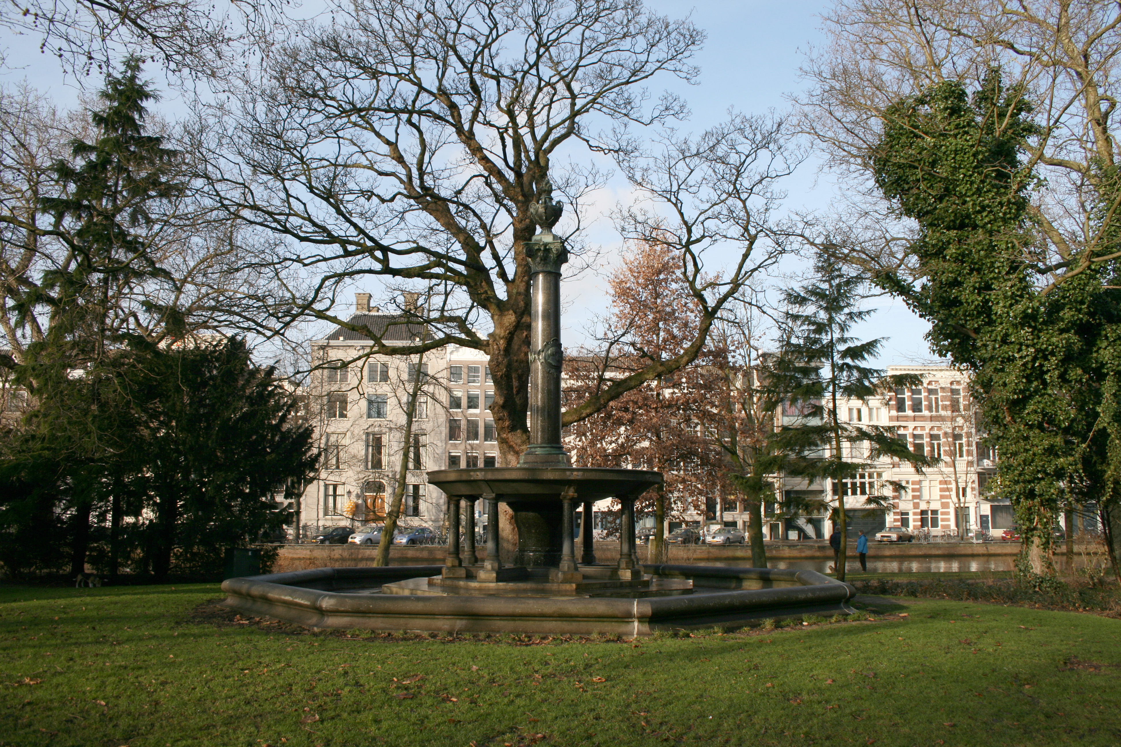 Wertheimpark fontein, Amsterdam, Holland.